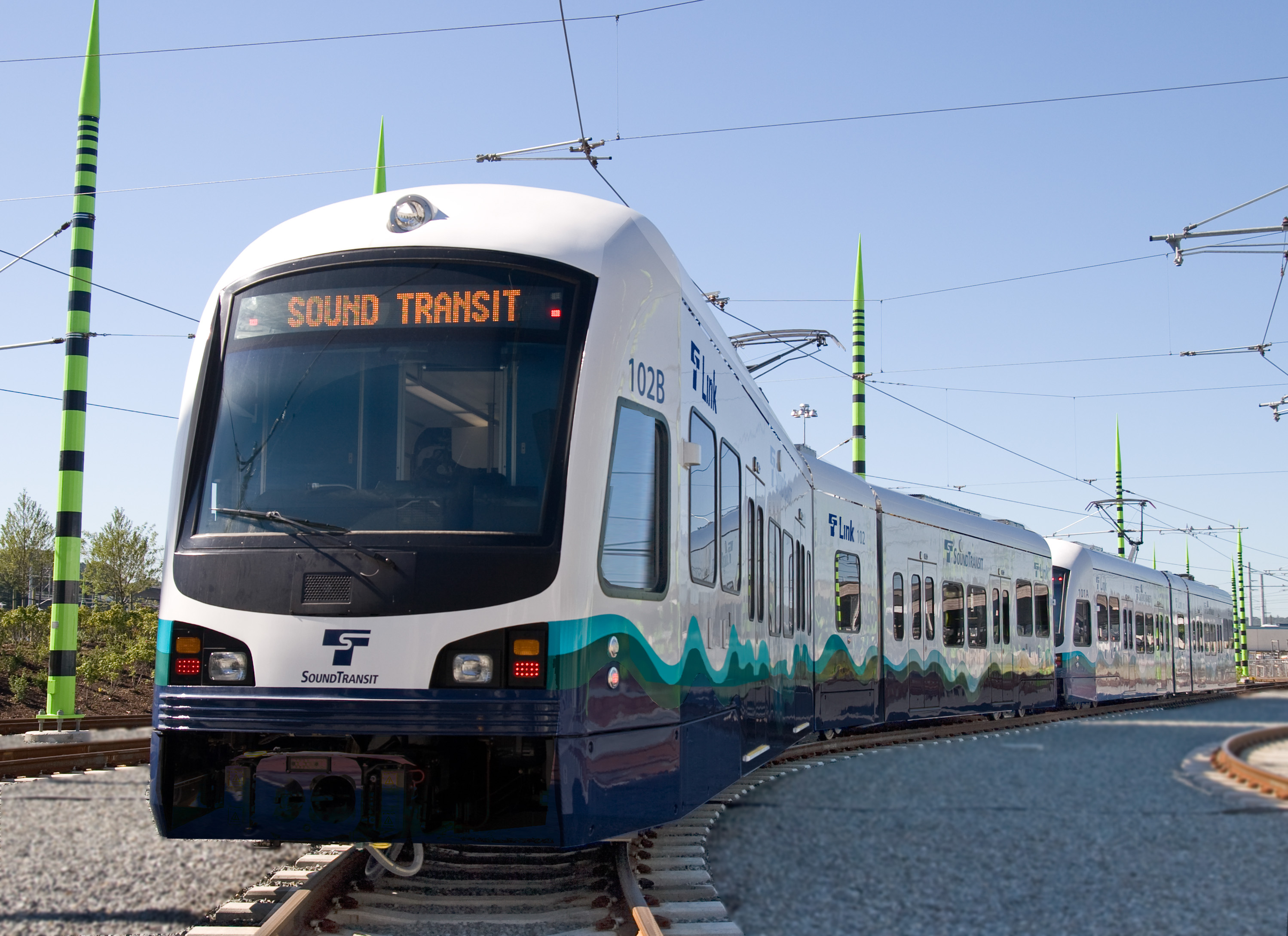 LNK_OMside_807